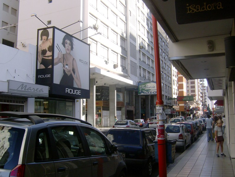 Calle Alsina, Bahía Blanca, Argentina